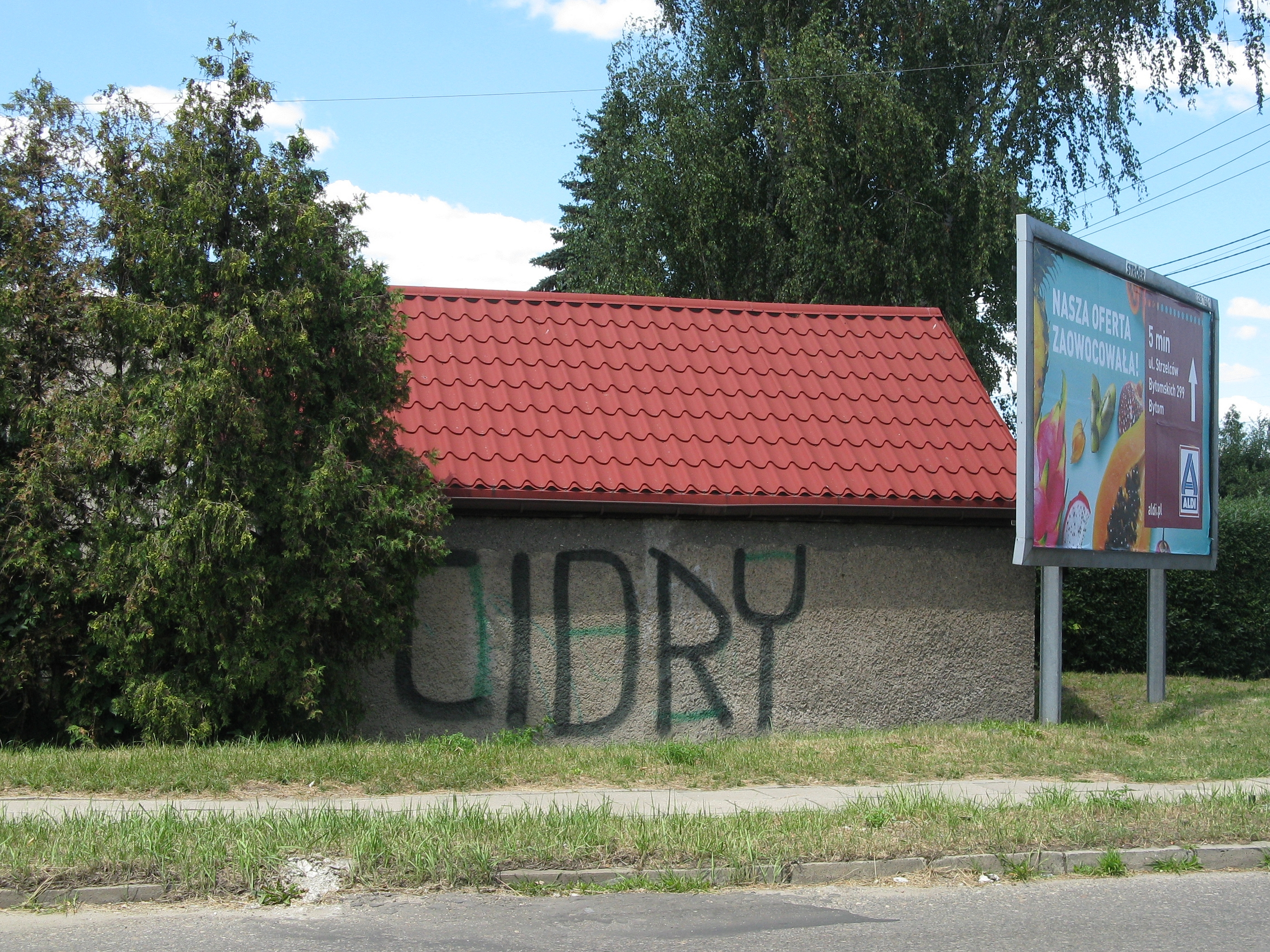 Graffiti „Cidry” na ścianie budynku przy ulicy Południowej 9 w Radzionkowie-Rojcy.